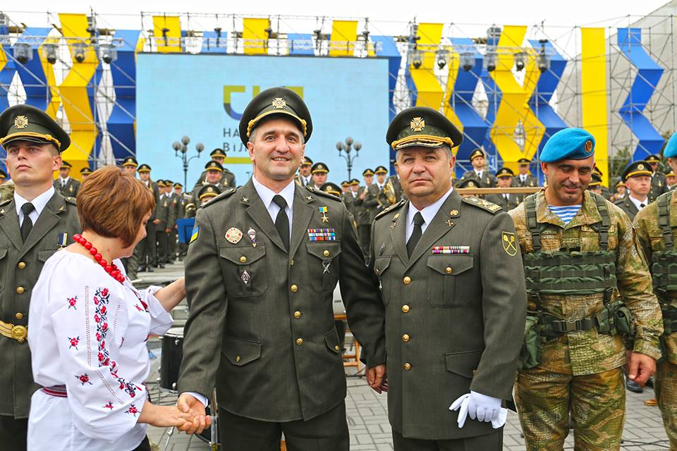 Герой України Олександр Гордійчук і міністр оборони Степан Полторак